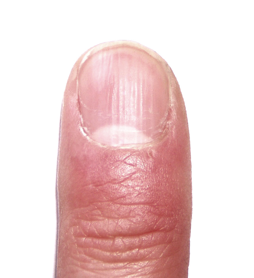 Gruebchenbildung